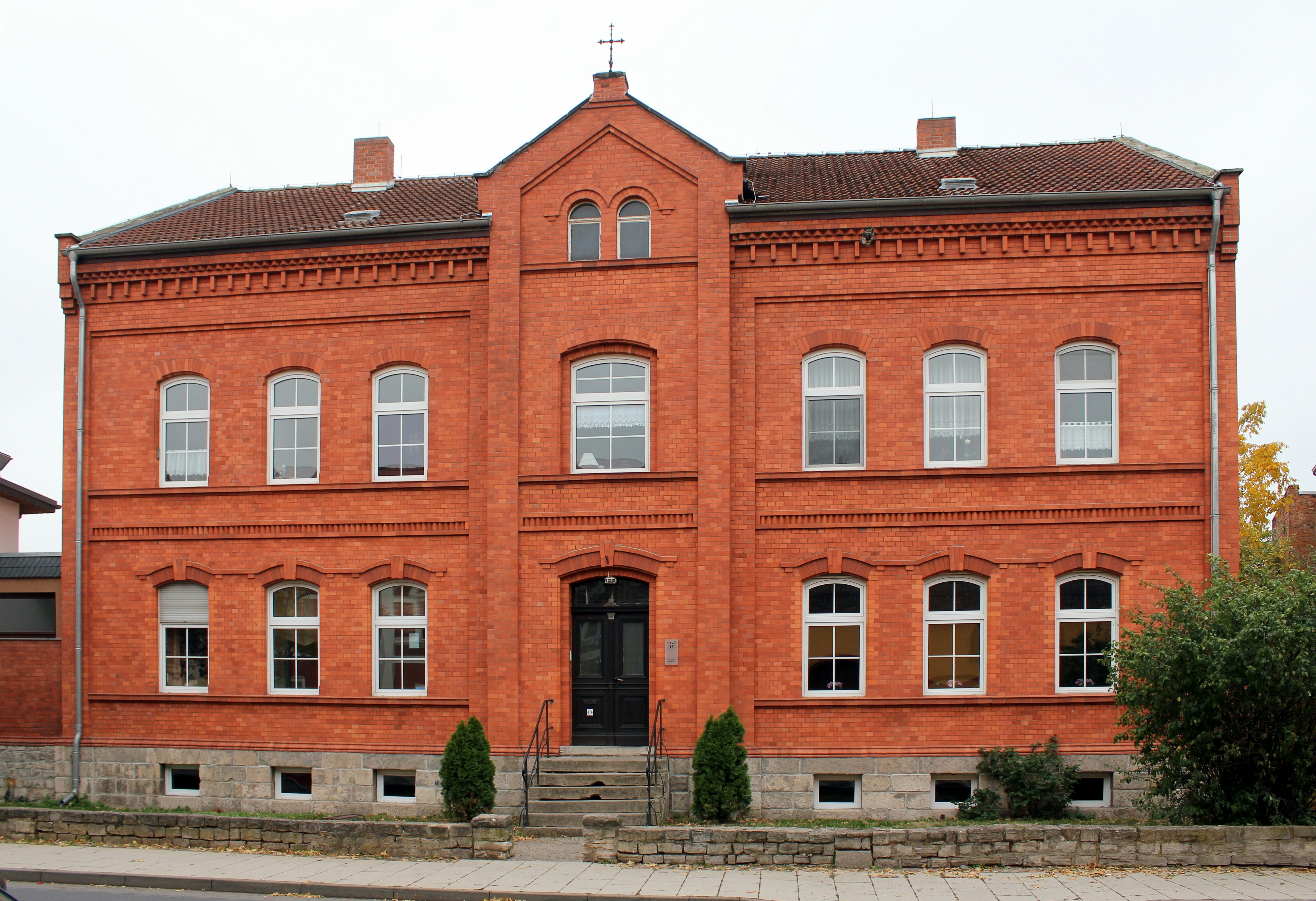 Schule Ludwig-Fuchs-Straße 10 Barby